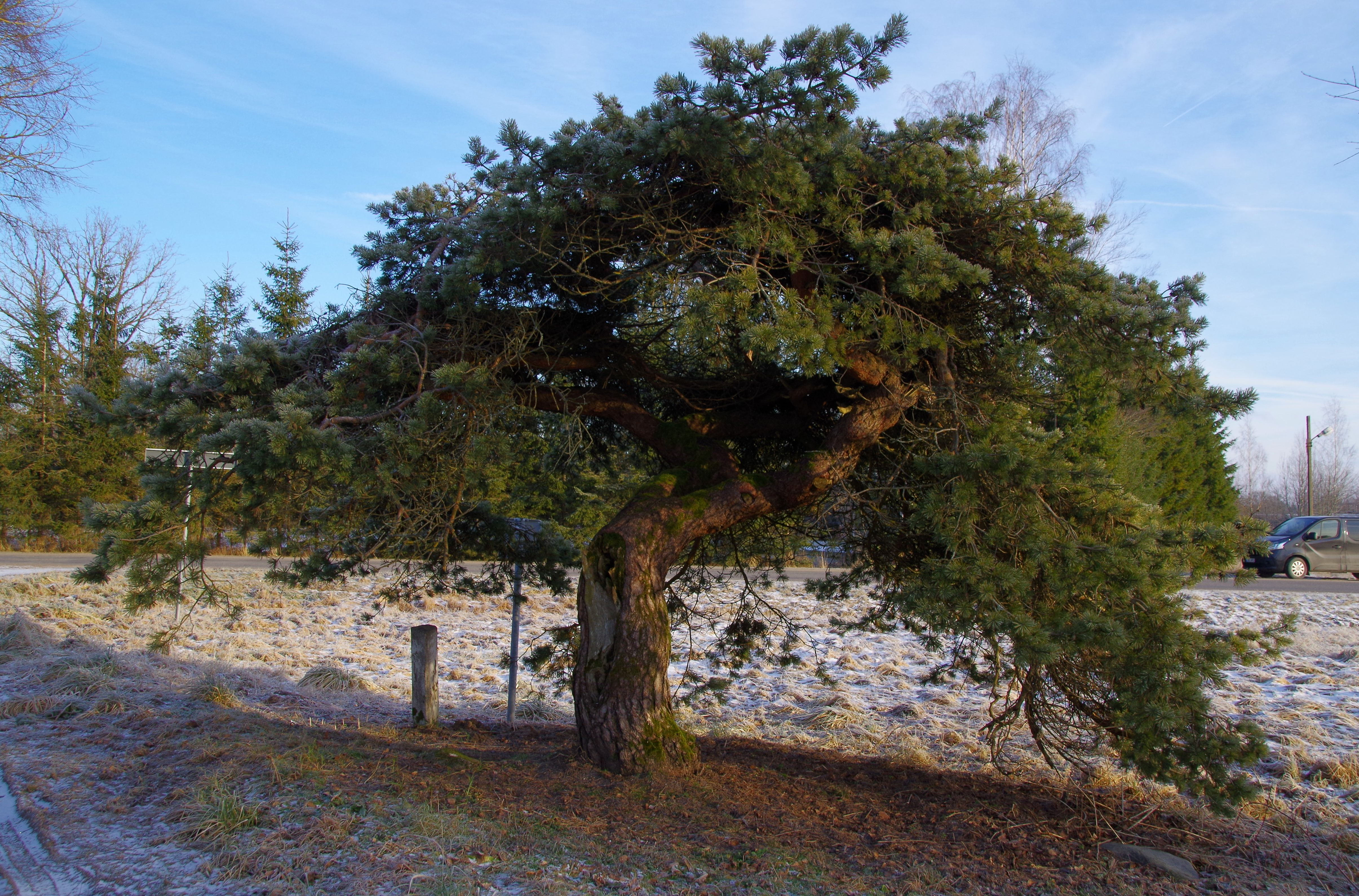 Päkapiku mänd kasvab Tori vallas Jõesuu küla juures, kust tee keerab Soomaa rahvuspargi suunas.